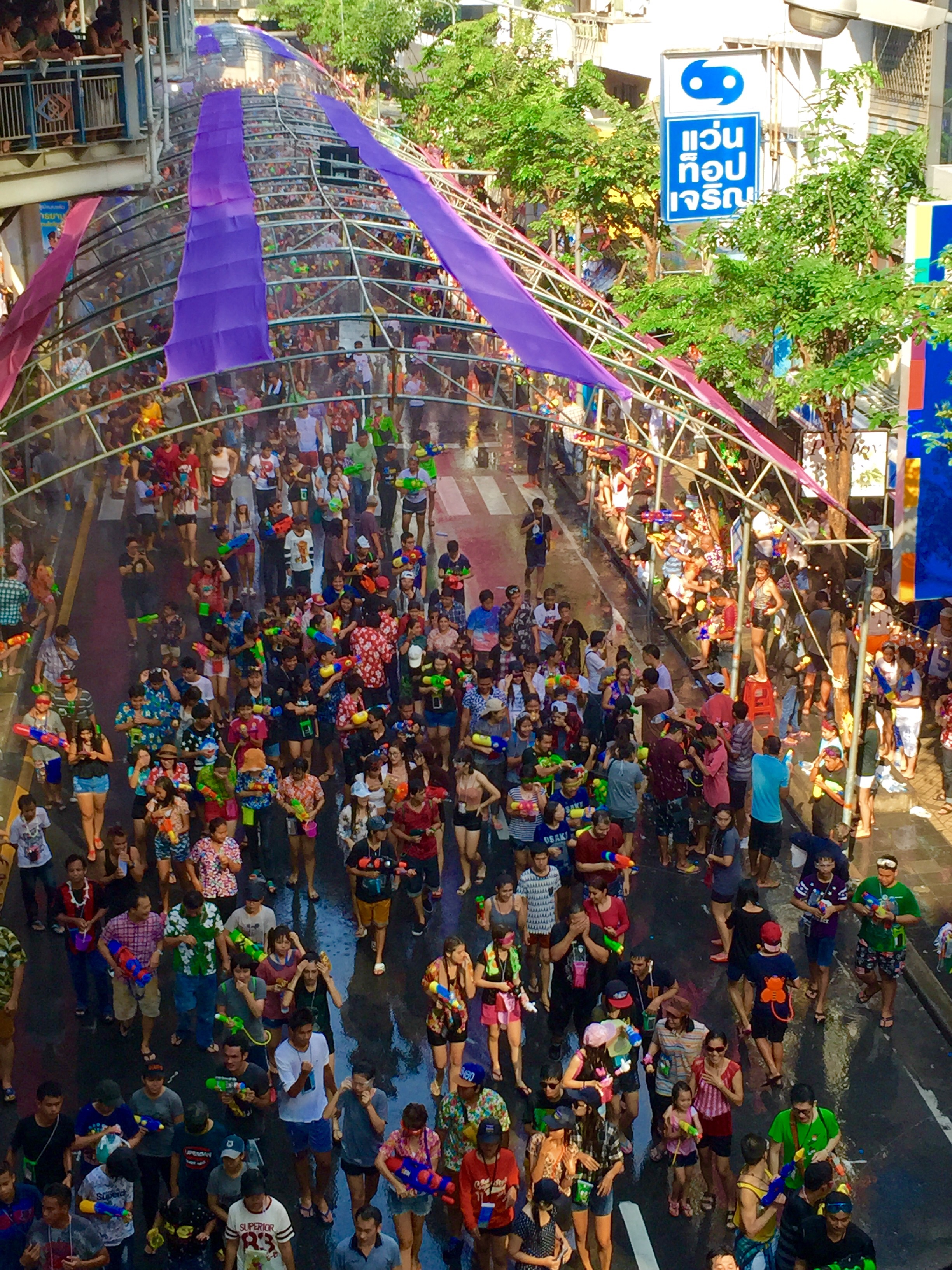 Le hoi songkran, silom road, Silom, Bang Rak, Bangkok, Thái Lan